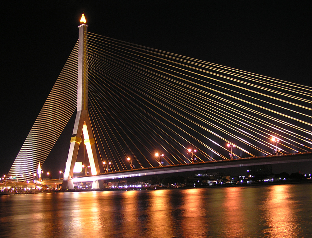 Rama VIII Bridge, Bangkok, at night.